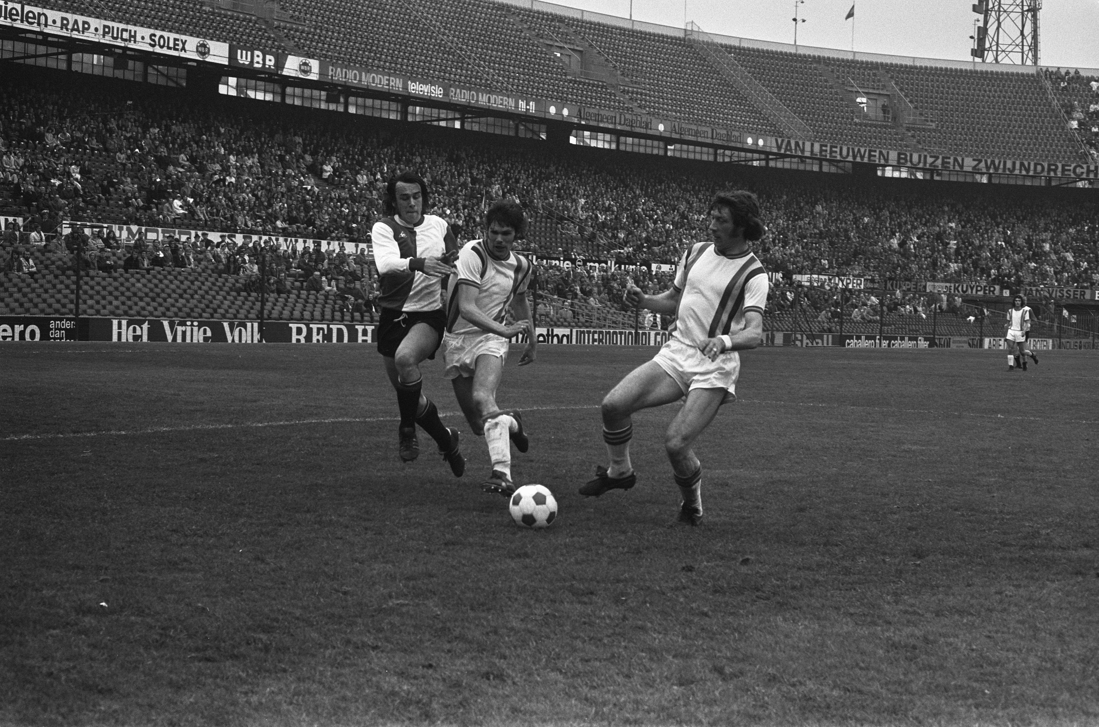 Collectie / Archief : Fotocollectie Anefo Reportage / Serie : [ onbekend ] Beschrijving : Feyenoord tegen Den Haag 2-0, v.l.n.r. Peter Ressel (Feyenoord), Leo de Caluwé en Aad Mansveld Datum : 25 maart 1973 Locatie : Rotterdam, Zuid-Holland Trefwoorden : sport, voetbal Persoonsnaam : Caluwe Leo De, Mansveld, Aad, Ressel Peter Instellingsnaam : FC Den Haag, Feyenoord Fotograaf : Verhoeff, Bert / Anefo Auteursrechthebbende : Nationaal Archief Materiaalsoort : Negatief (zwart/wit) Nummer archiefinventaris : bekijk toegang 2.24.01.05 Bestanddeelnummer : 926-2993